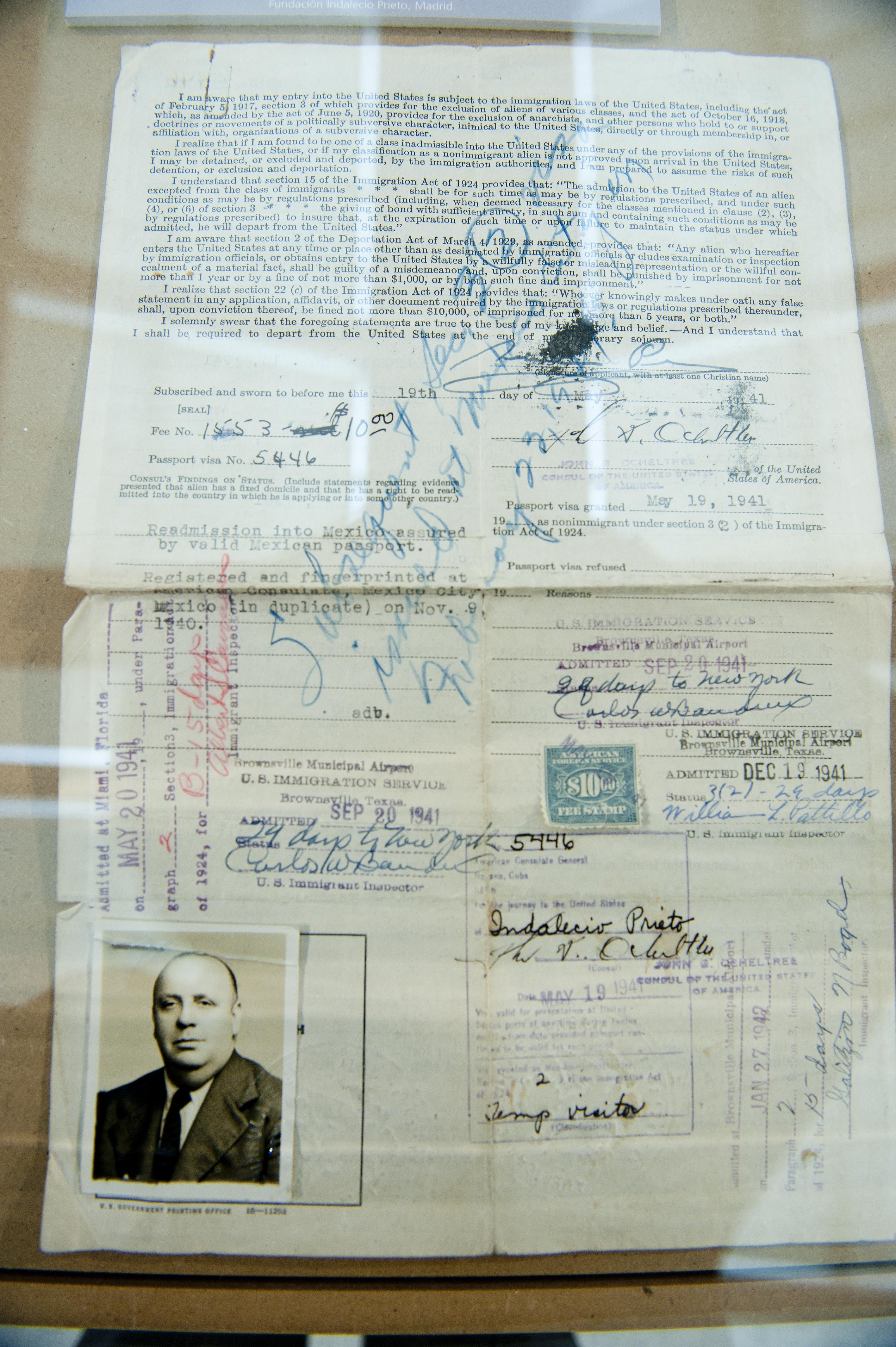 Exposición 'Indalecio Prieto en la política vasca, 1883-1962'